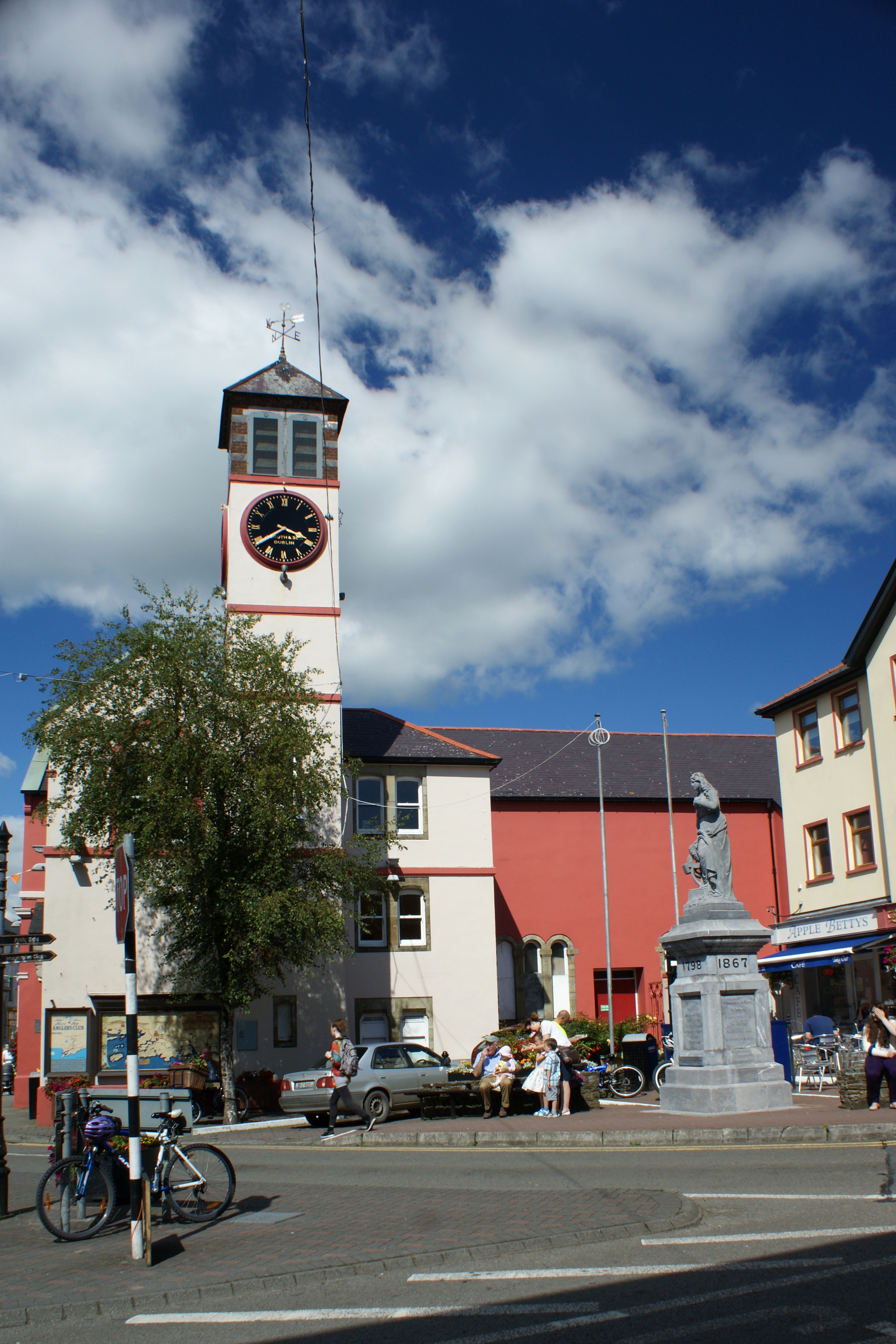 with church and statue